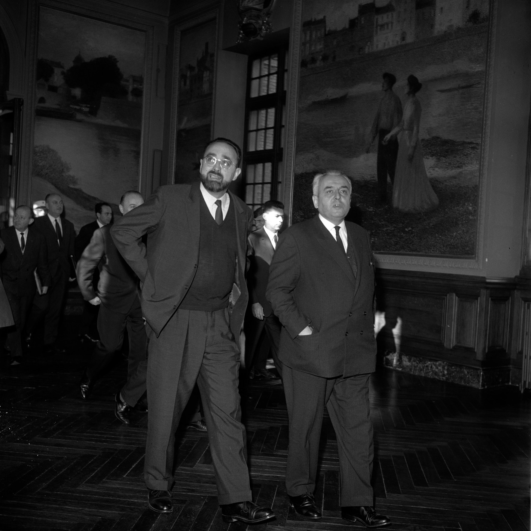 Salle du Capitole. Le 26 Novembre 1965. Vue de Louis Bazerque et de Monsieur Pisani.